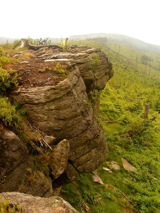 Wychodnie piaskowców istebniańskich pomiędzy szczytem Magurki Radziechowskiej, a Magurki Wiślańskiej.